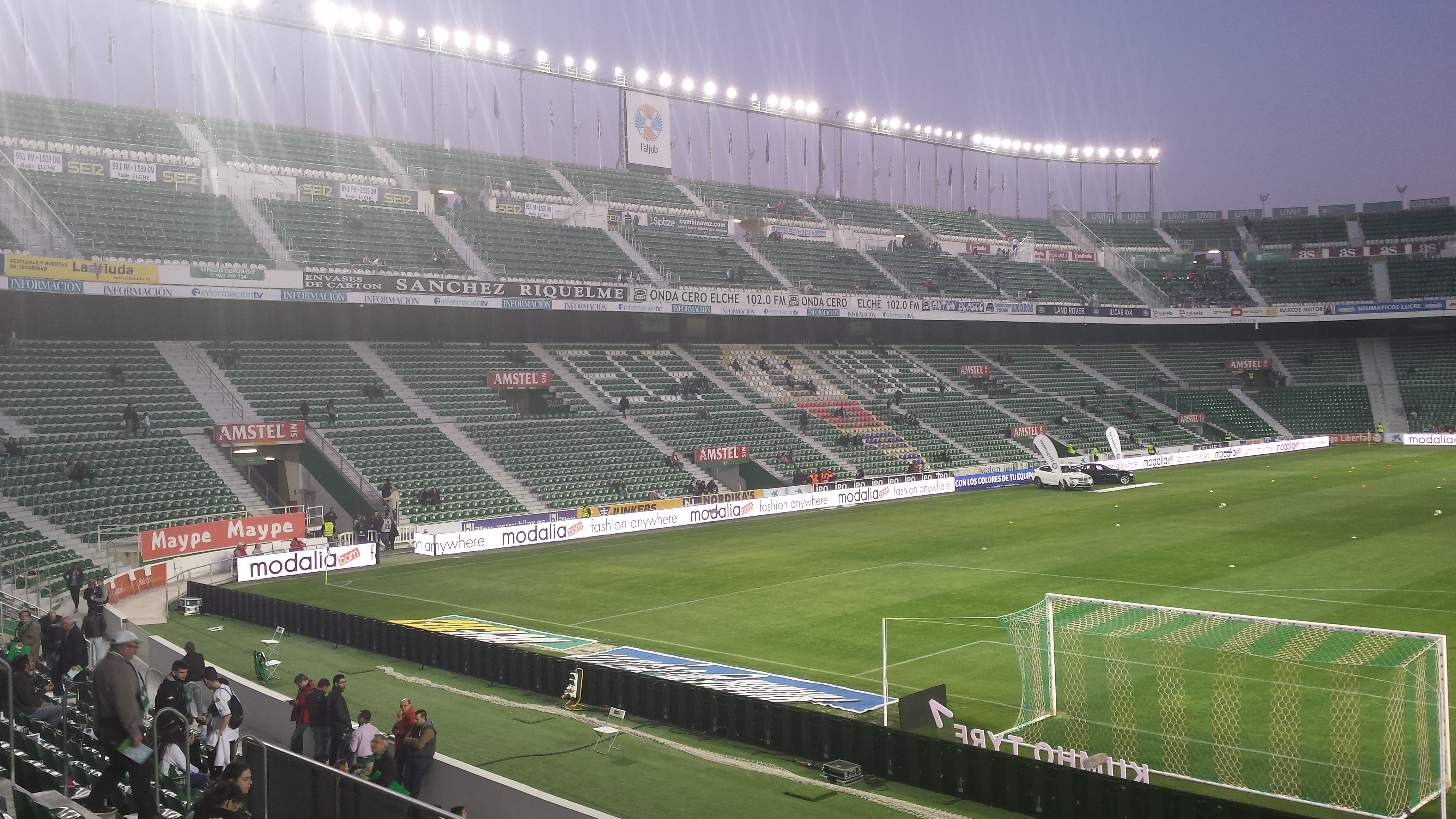 Visión interior del estadio tras la reforma